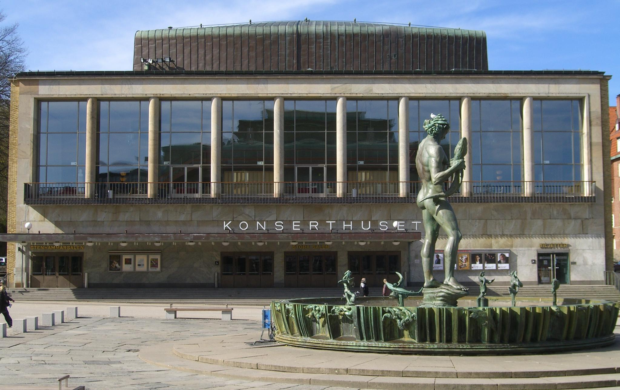 Gothenburg, Konserthuset, Götaplatsen, Sweden